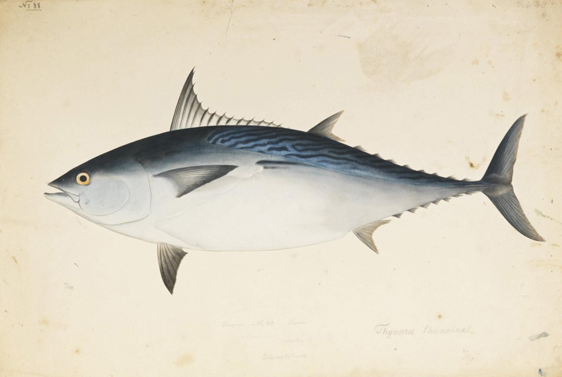 Euthynnus affinis (Cantor)